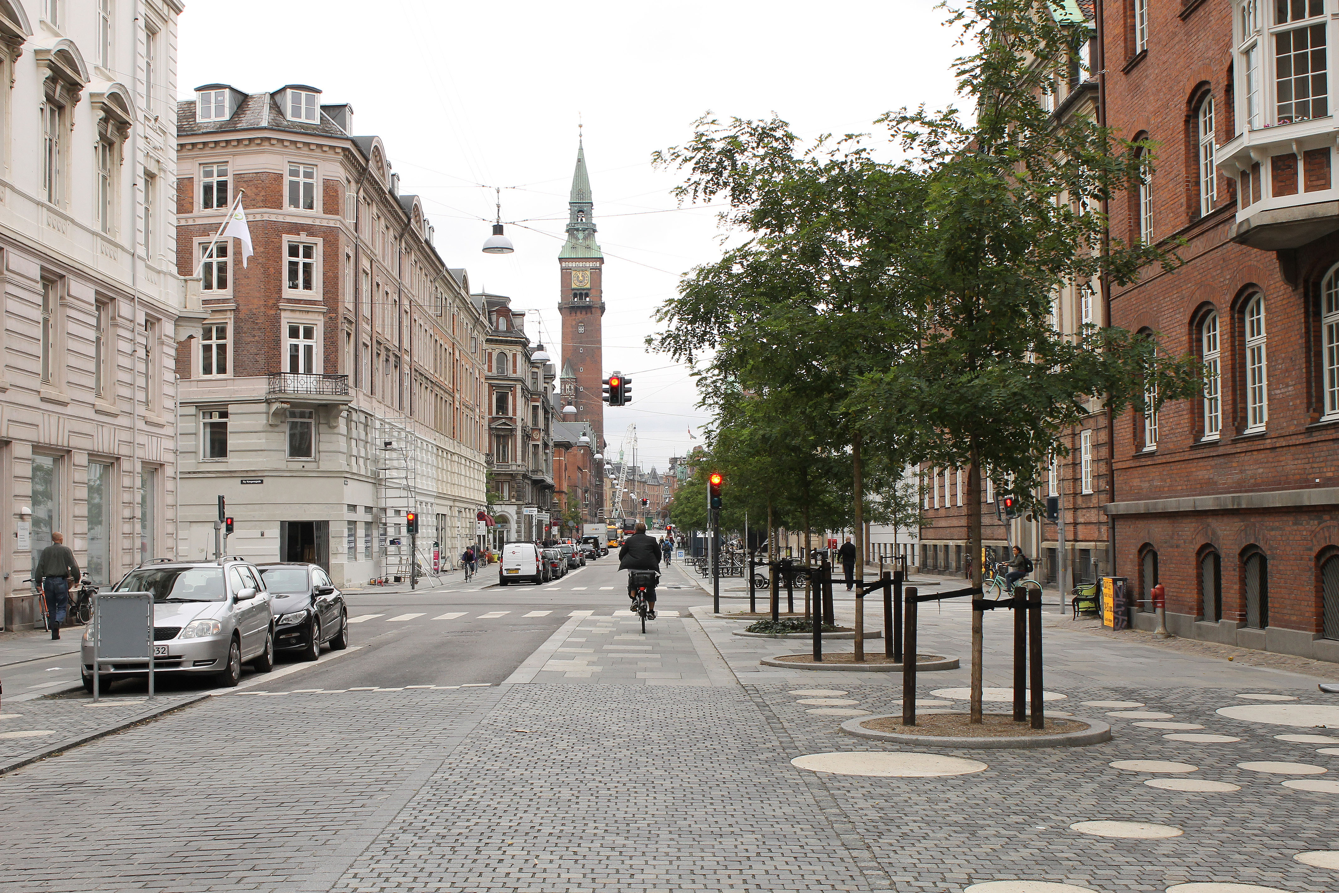 Vester Voldgade in Copenhagen, Denmark